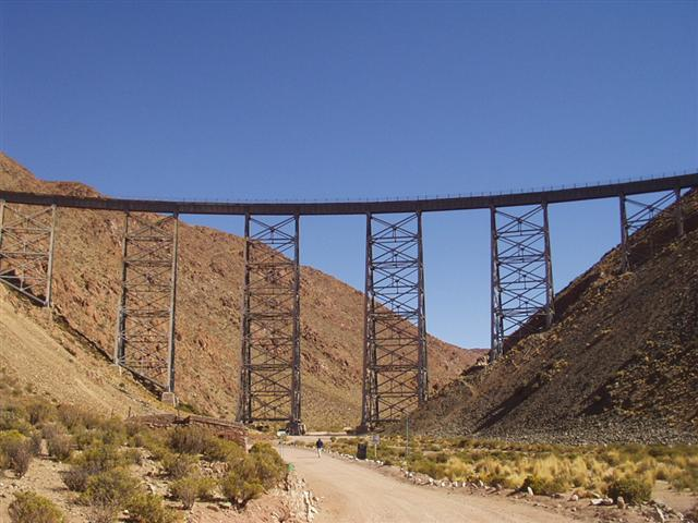 Viaducto de La Polvorilla Salta Argentina